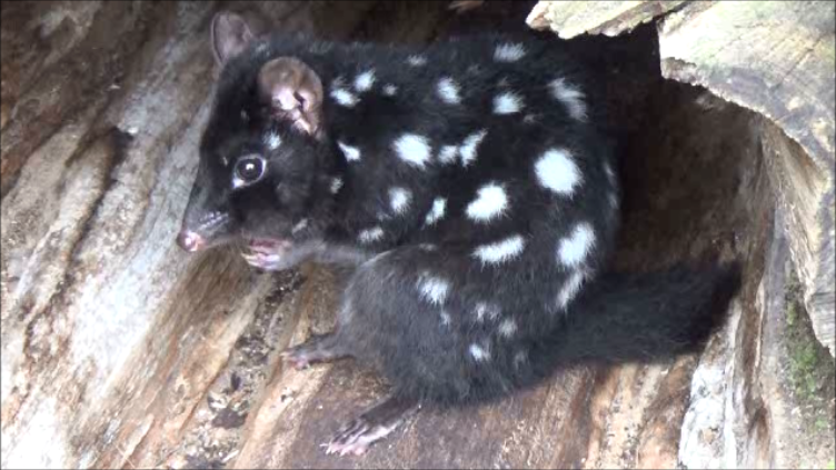 Dasyurus viverrinus wiki1